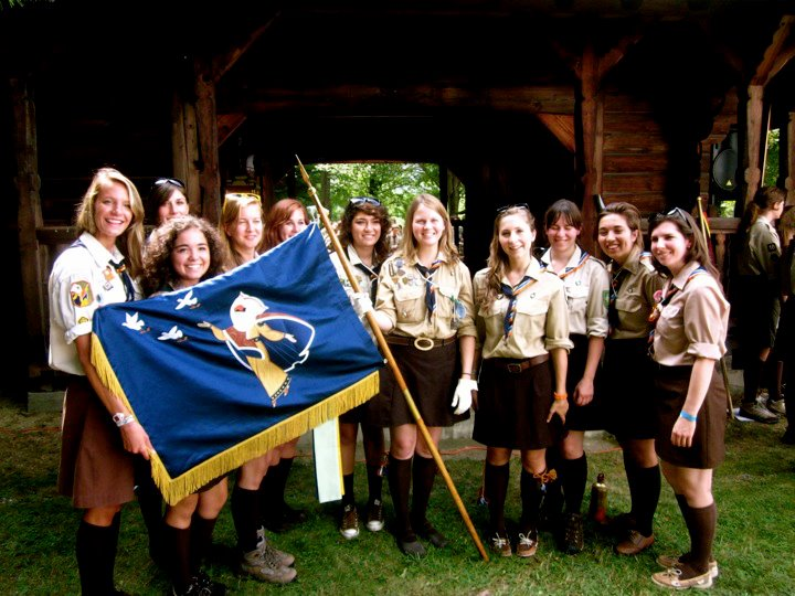 МПЗ 2011